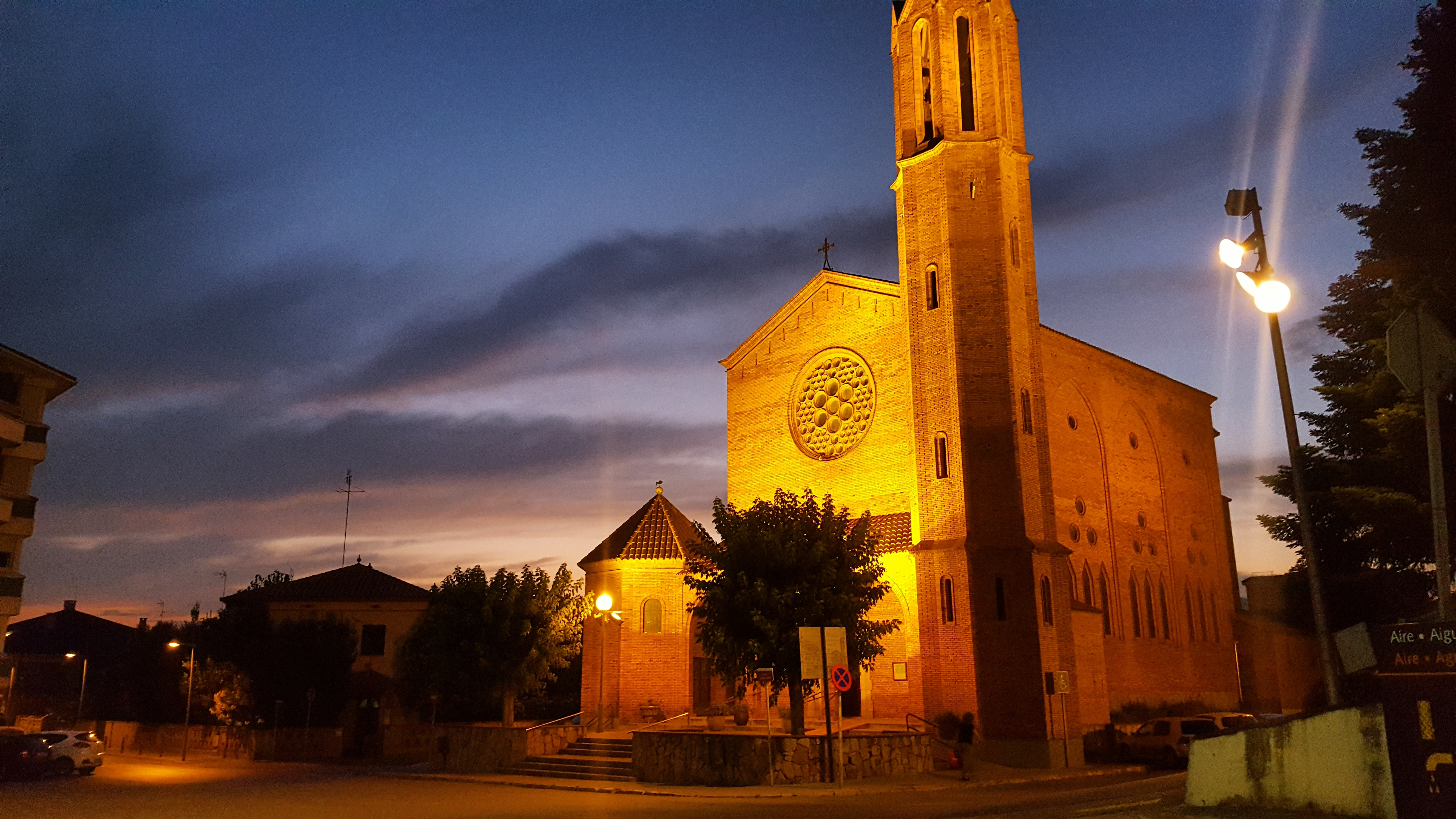 Esglèsia de Sant Genís des de l'Av.Catalunya